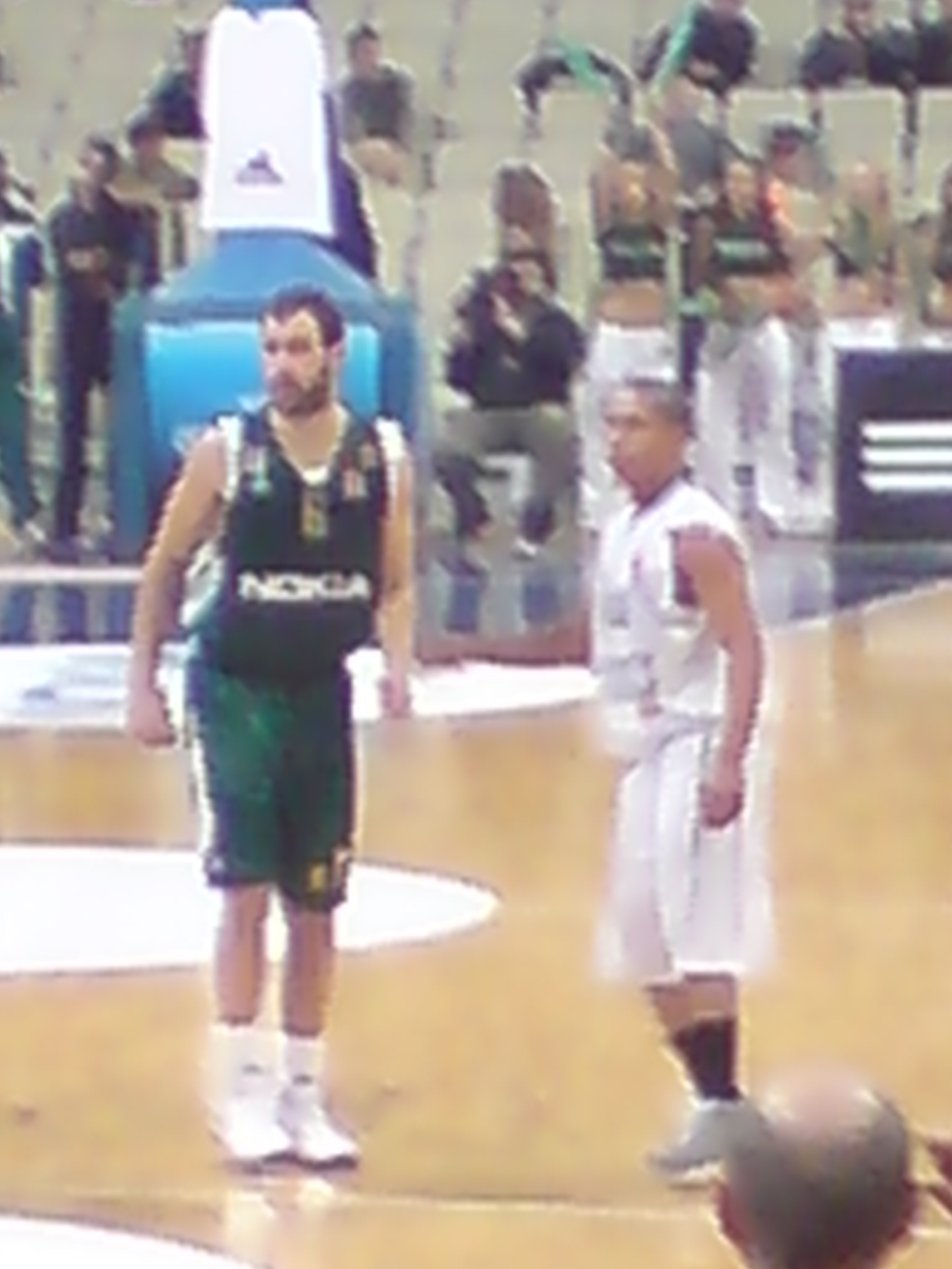 Vasilis Spanoulis